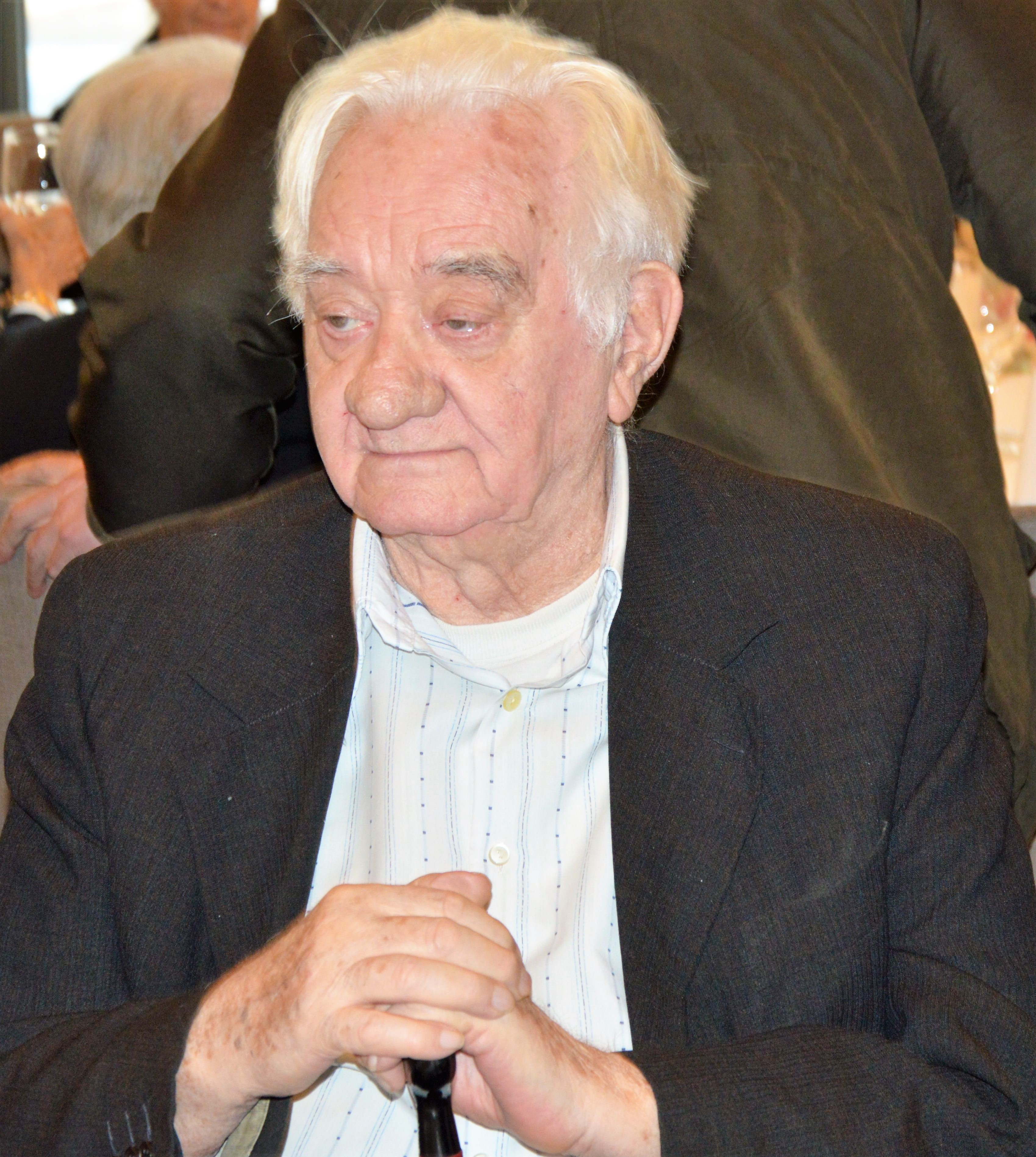 Holop Miklós olimpiai ezüstérmes vízilabdázó